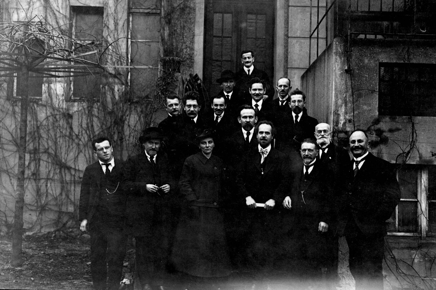 Mitglieder des USPD - Vorstand